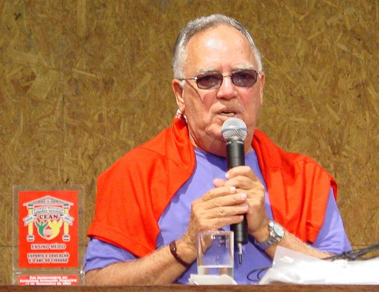 O jornalista Armando Nogueira no estado do Acre.